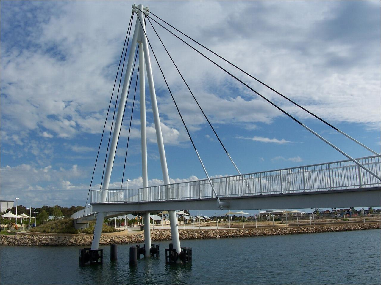 Mandurah Ocean Marina Bridge